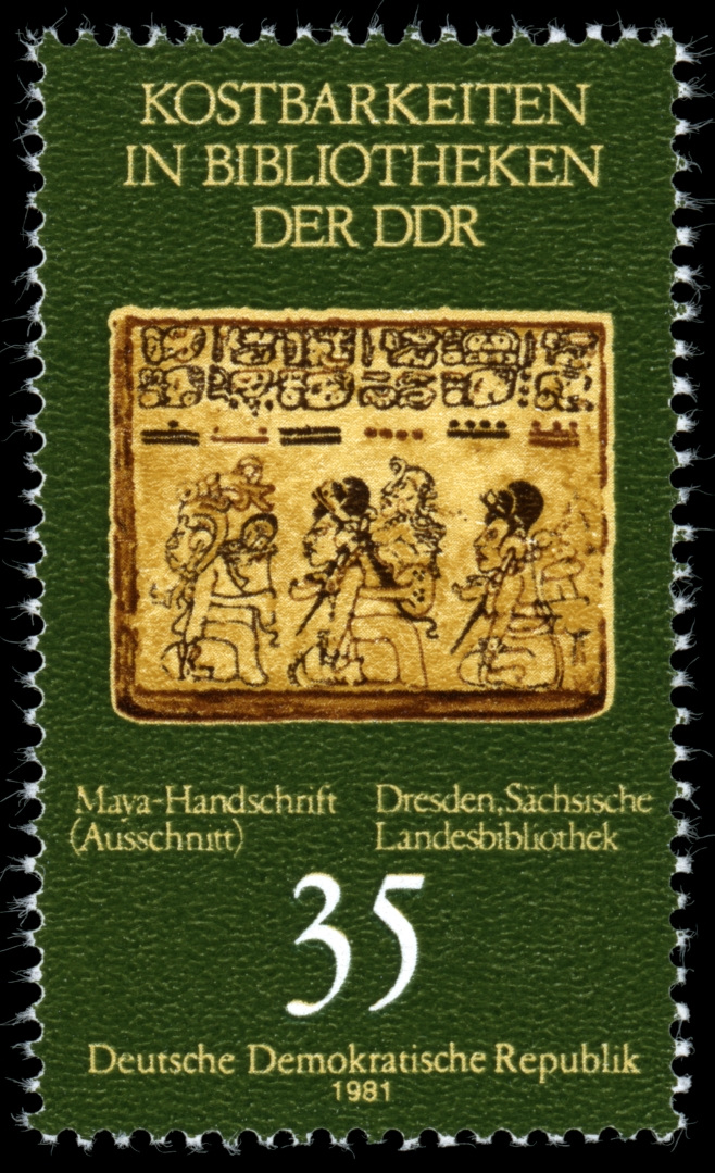 Information: Kostbarkeiten in Bibliotheken der DDR: Maya-Handschrift (Detail), Sächsische Landesbibliothek Dresden Ausgabepreis: 35 Pfennig First Day of Issue / Erstausgabetag: 18. August 1981 Auflage: 4.000.000 Entwurf: Müller Druckverfahren: Rastertiefdruck Michel-Katalog-Nr: Ländercode-MiNr: 2637